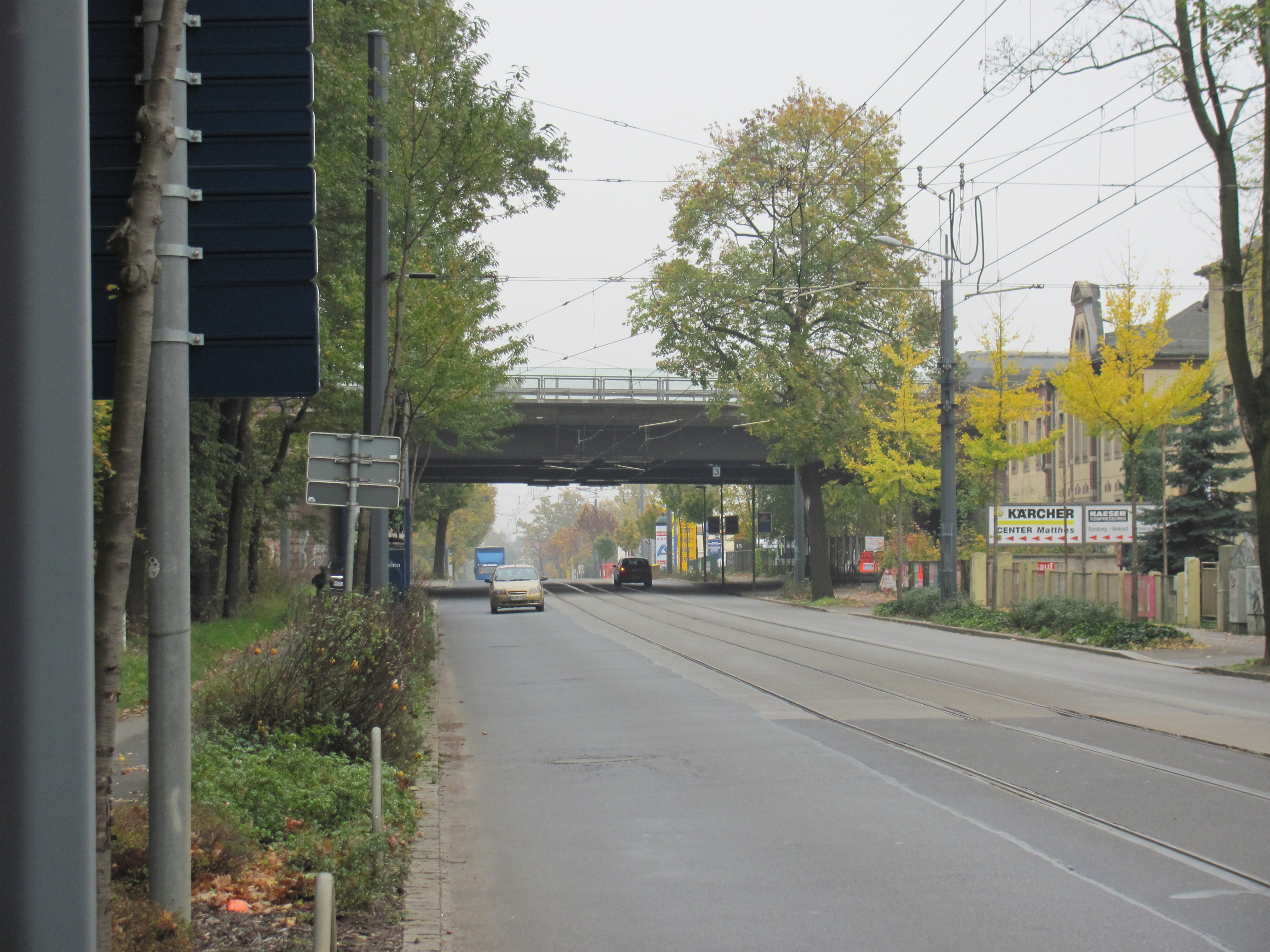 Alt-Radebeul, Meißner Straße mit Unionbrücke (Bundesautobahn 4), Blick Richtung Dresden